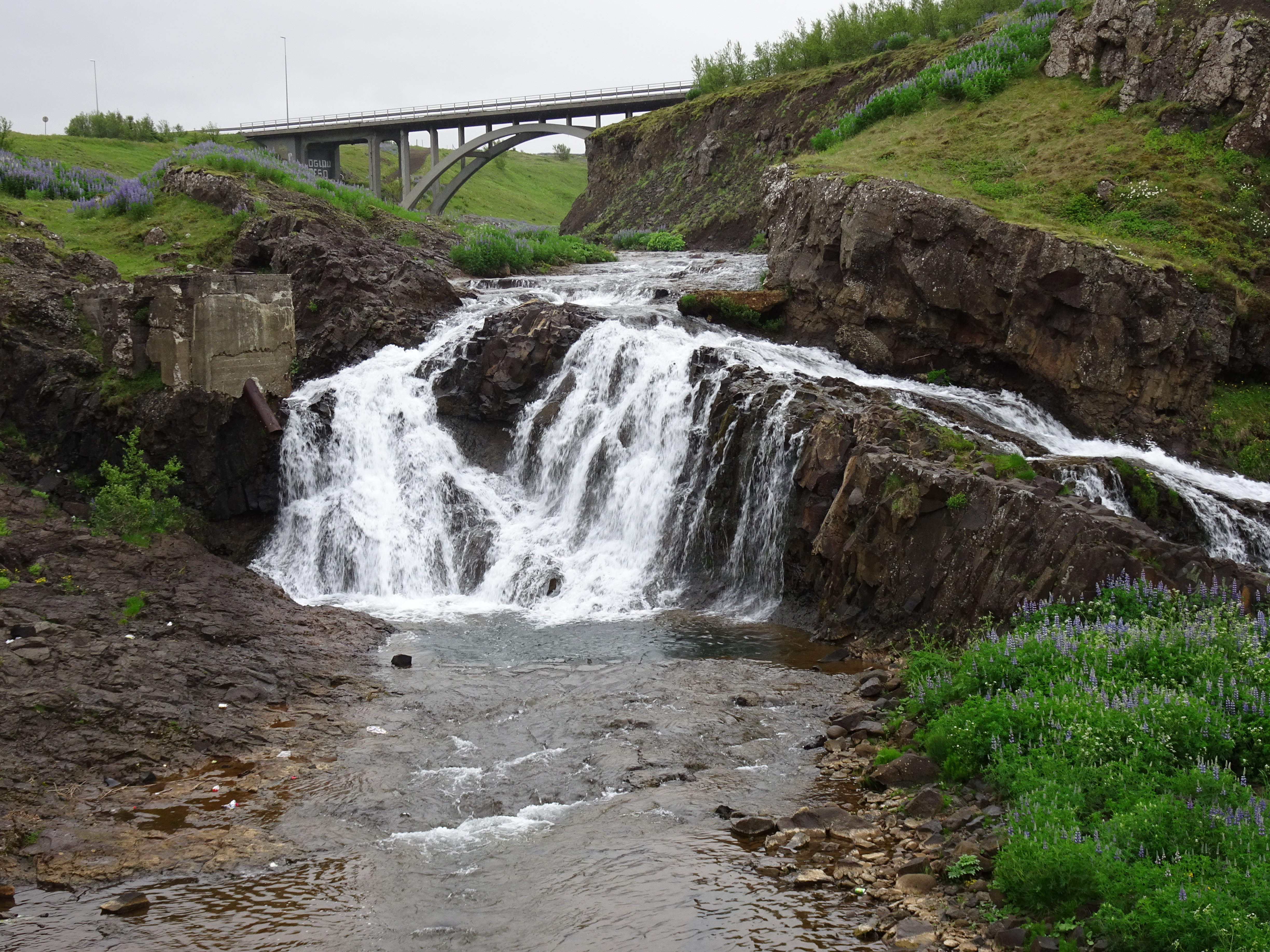 De Tungufoss, een kleine waterval bij Mosfellsbær, een voorstad van Reykjavík, IJsland, in de buurt.